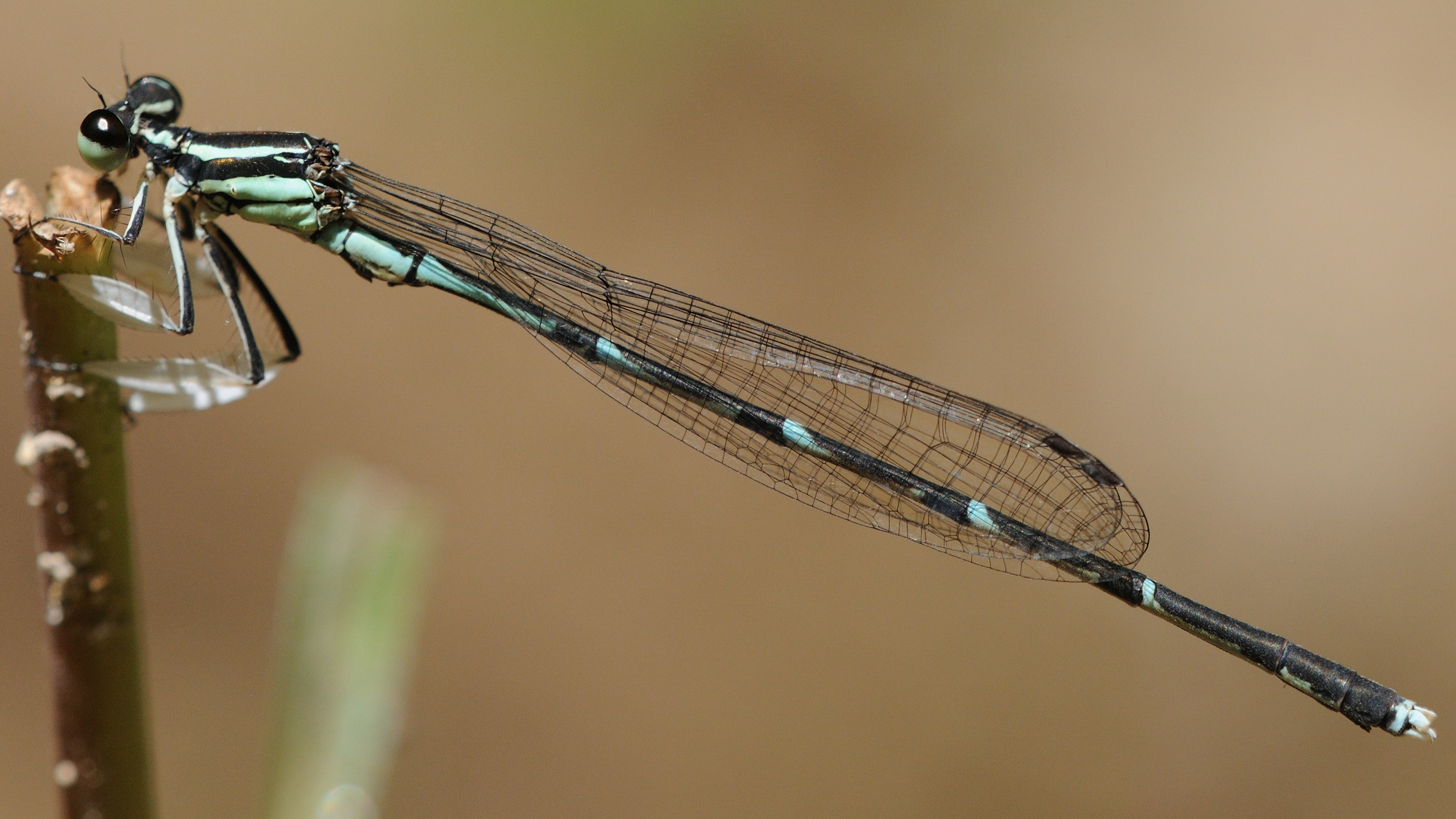 グンバイトンボ雄 広島県